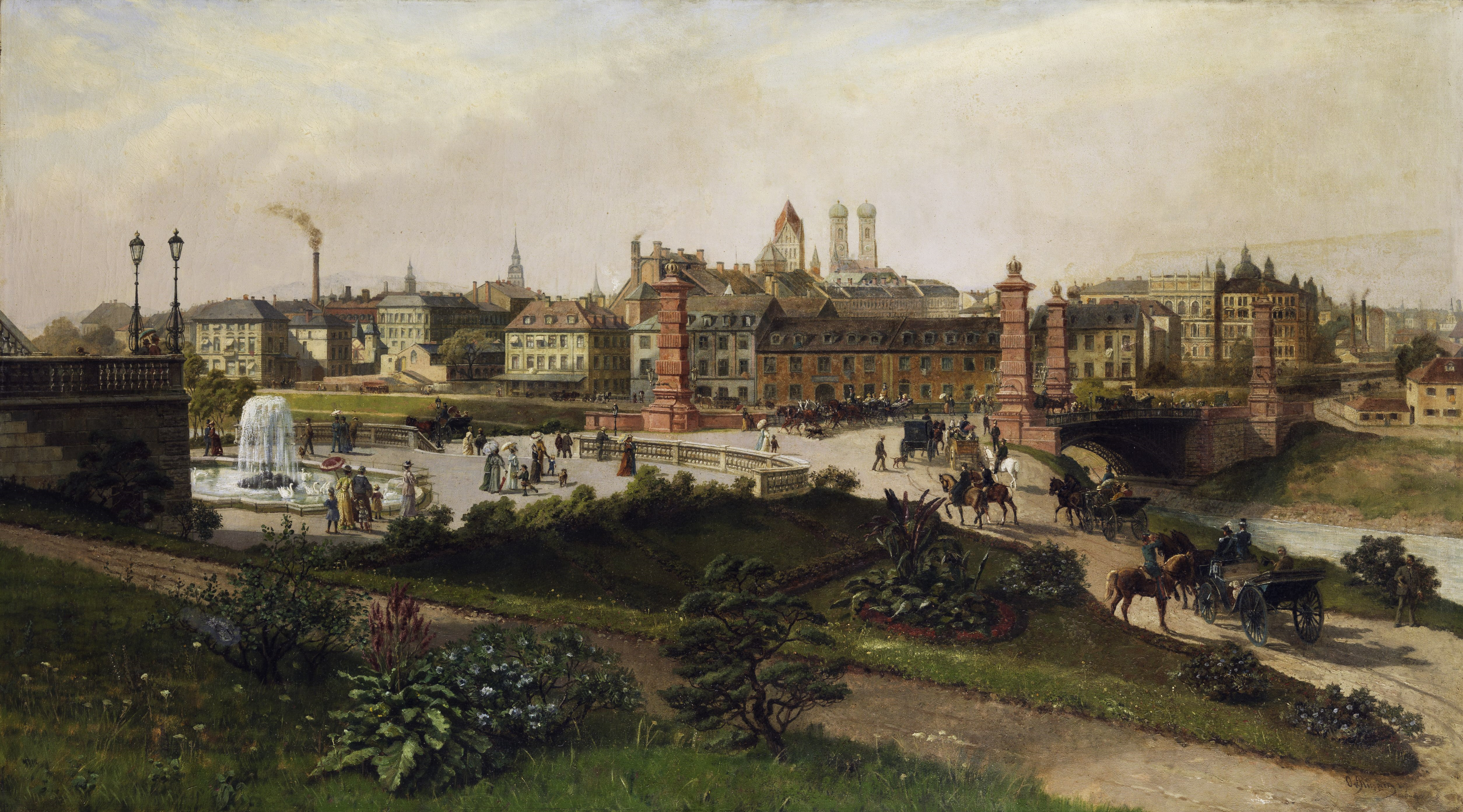 Blick über München. „Prinz-Regent-Brücke München“. Öl auf Leinwand. 79 x 141 cm.